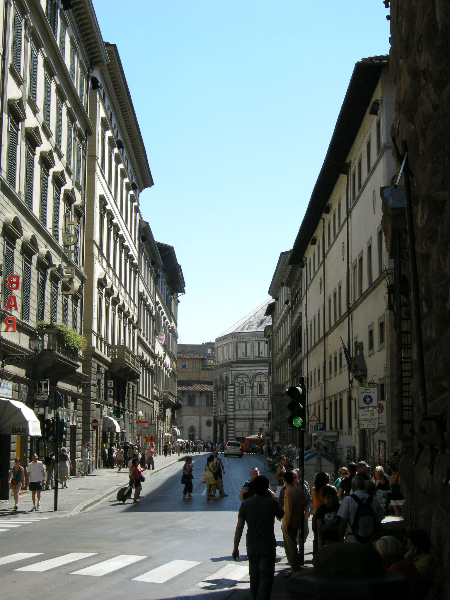 Via de' martelli, view2